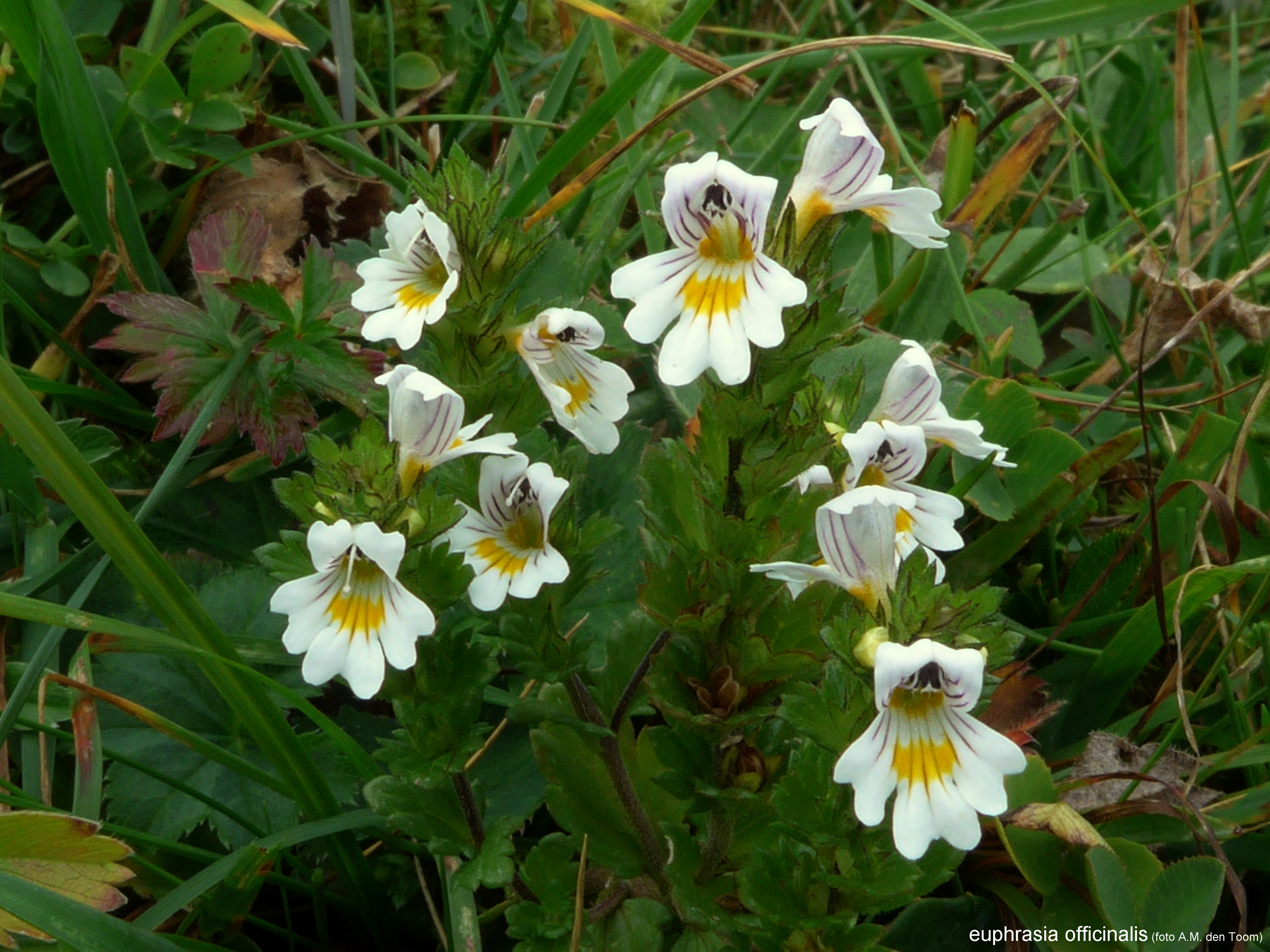 Euphrasia officinalis